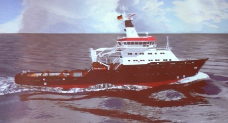 Notschlepper Nordsee